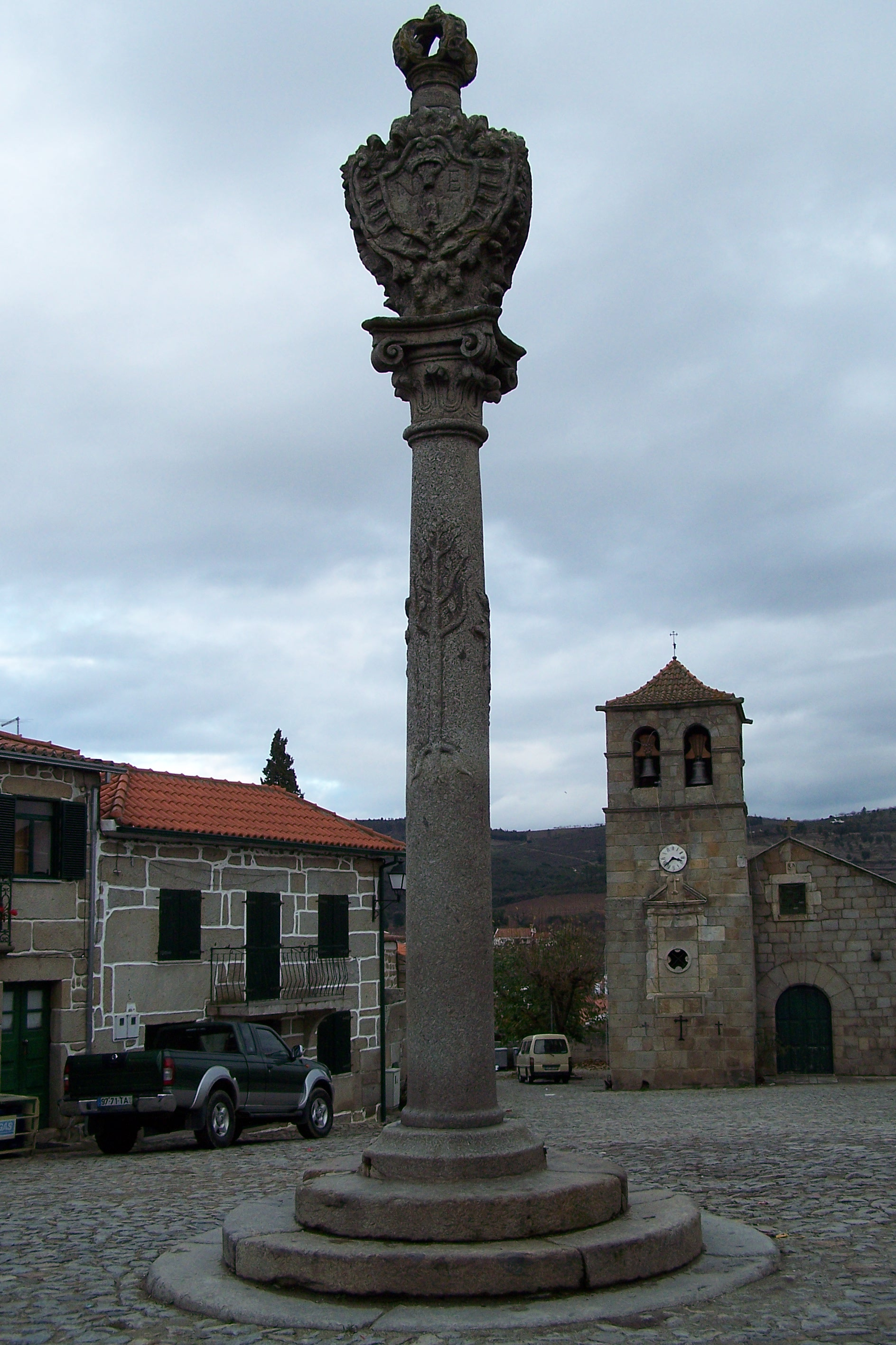 Pelourinho de Freixo de Numao